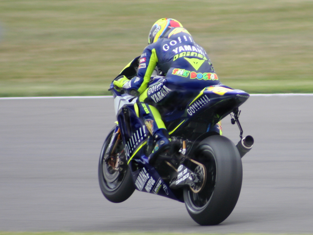 Valentino RossiVale Wheelies